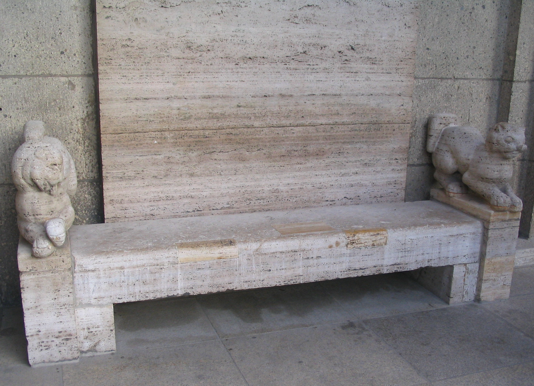 Carl-Moritz Schreiner, 2 Bänke (die linke Bank) neben dem Osteingang des Museum Kunstpalast, Ehrenhof, Robert-Schumann-Saal.